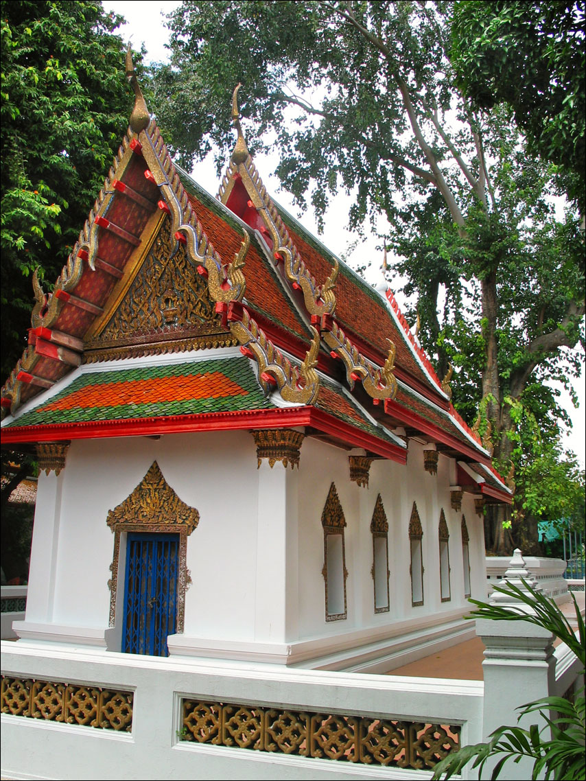 "Viharn Pho Langka" and Bodhi Tree, Wat Mahathat, Bangkok, Thailand